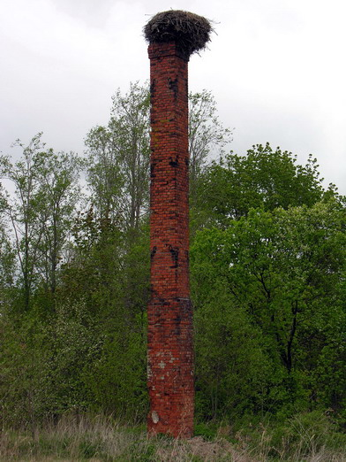 Bugenių plytinės (Mažeikių raj.) kaminas, 2006 m. Foto: Algirdas, 2006 m. gegužės 16 d.